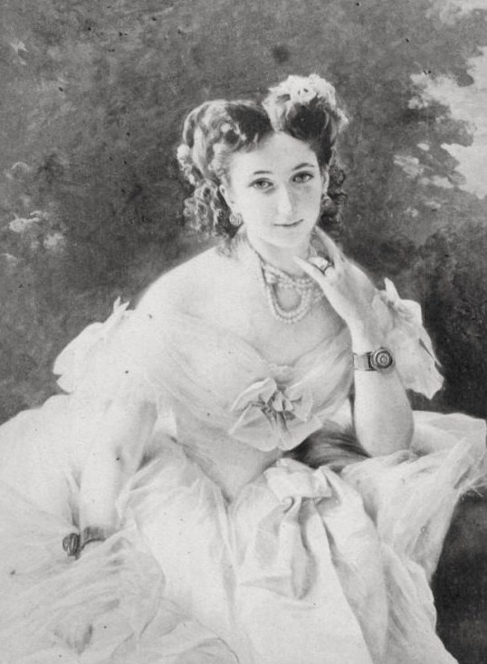 Графиня Толстая, блиставшая в Париже во время Второй Империи.